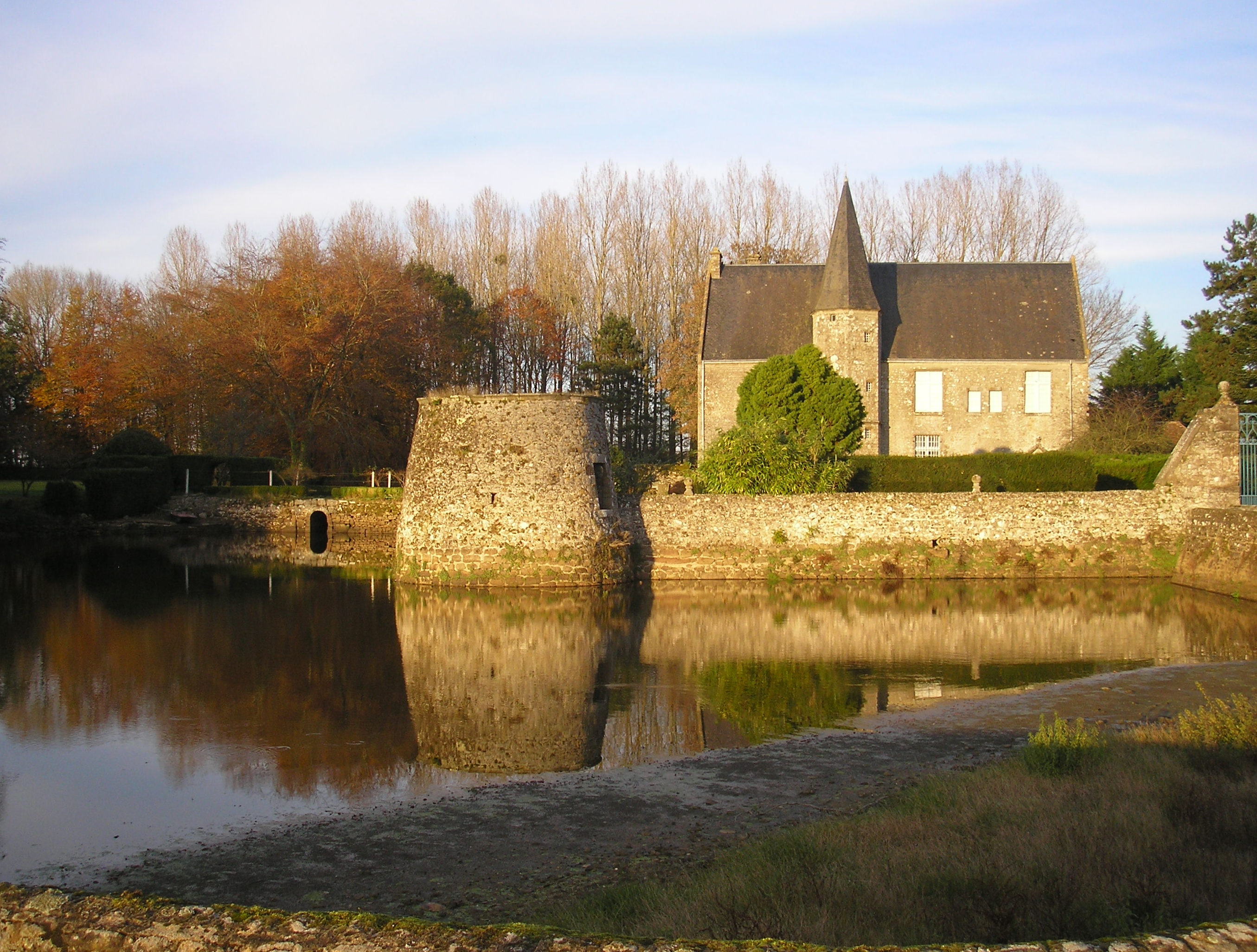 Joué-du-Bois (Normandie, France). Le manoir.